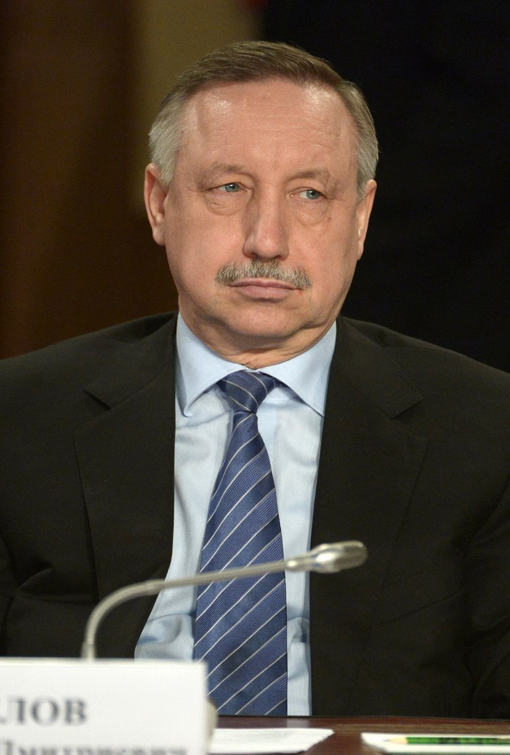 Полномочный представитель Президента в Центральном федеральном округе Александр Беглов на заседании президиума Госсовета по вопросам безопасности дорожного движения